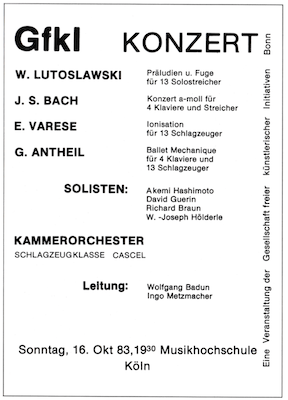 Konzertplakat einer Aufführung des "Ballet Mechanique" von George Antheil für 4 Pianisten und 13 Schlagzeuger aus dem Jahr 1983 in Köln an der dortigen Musikhochschule.